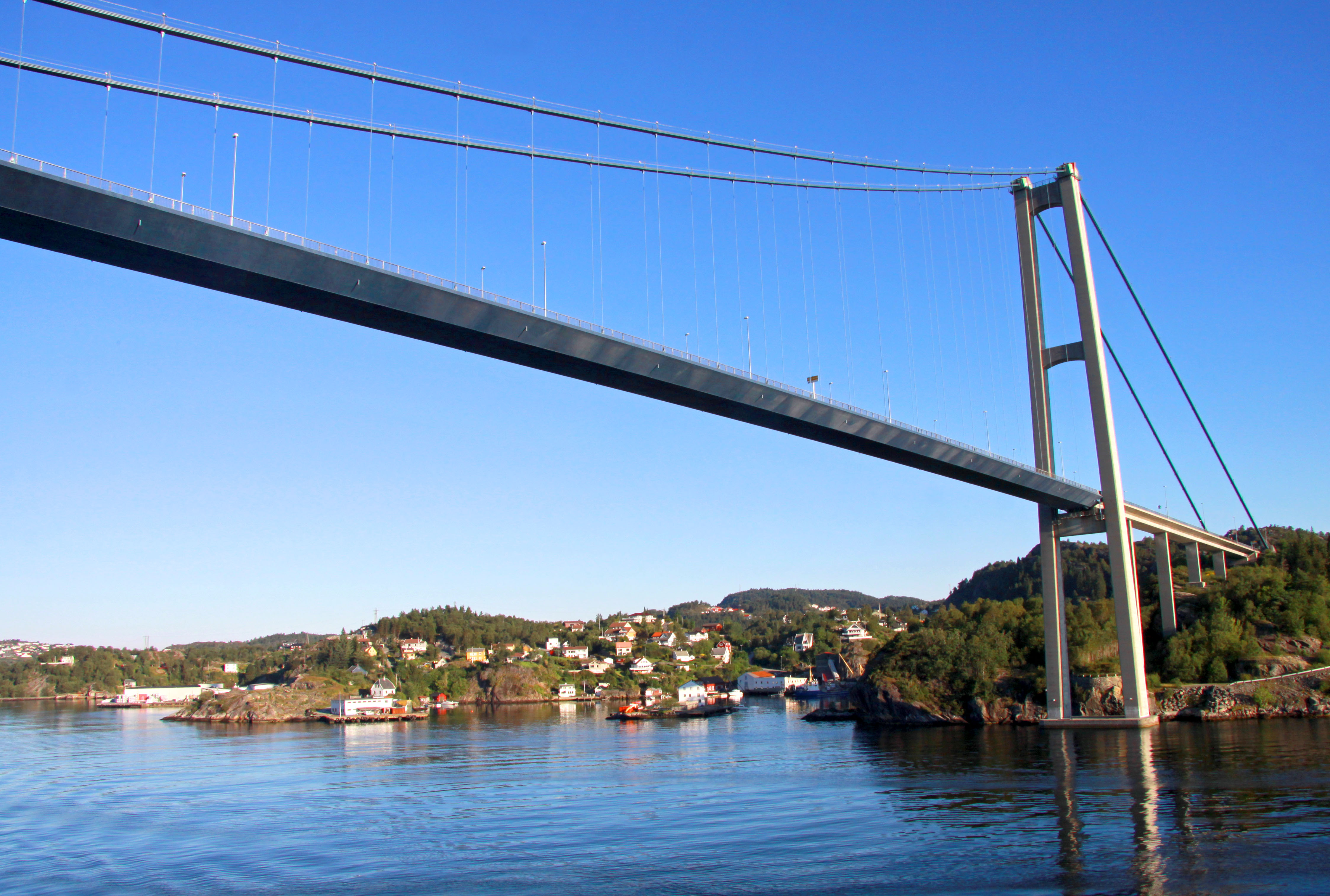 Bergen. Passage sous le pont d'Askøy.